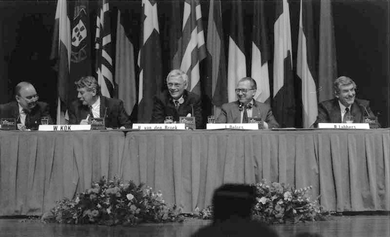 Persconferentie na het bereiken van een akkoord op de Eurotop in Maastricht in 1991. De top leidde tot het Verdrag van Maastricht en de introductie van de Euro. De persconferentie vond plaats in het MECC op 11 dec. 1991, om 2 uur 's nachts, na een slopende vergadering in het Gouvernement aan de Maas. Van links naar rechts: ?, minister van financiën Wim Kok, minister van buitenlandse zaken Hans van den Broek, Europese Commissievoorzitter Jacques Delors en premier Ruud Lubbers. Fotocollectie RHCL Maastricht, GAM 13350.